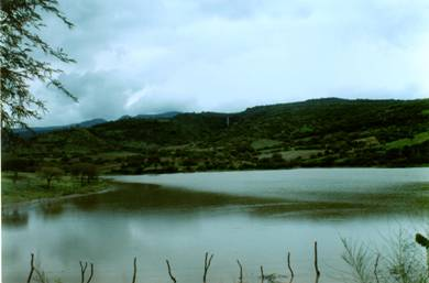 Presa Casa Blanca. Acababa de llover, esta presa se ubica a unos cuantos kilometros de la ciudad. Esta foto la tomé con una cámara Konica Autoreflex T2 y después escaneada.